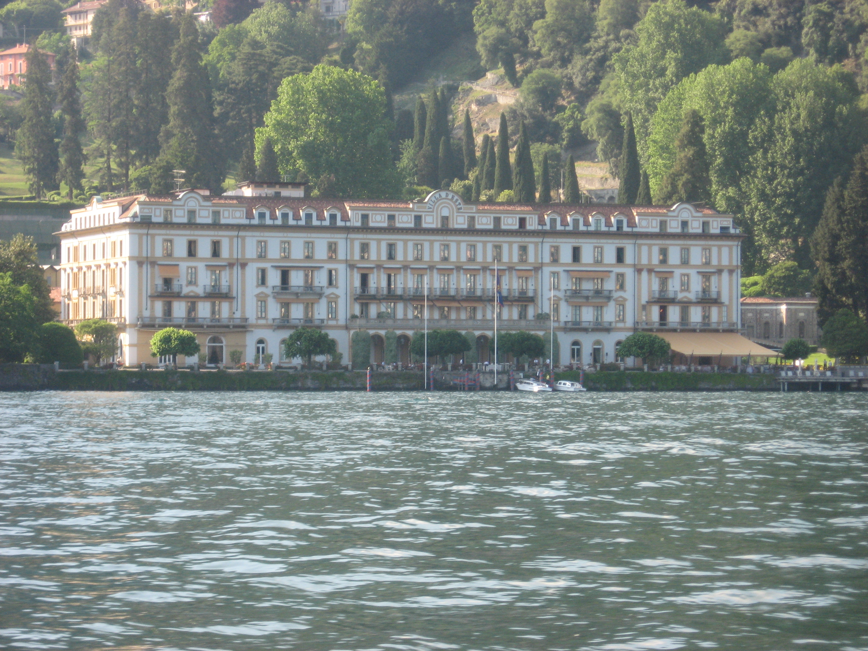 Villa d'Este, on Lake Como